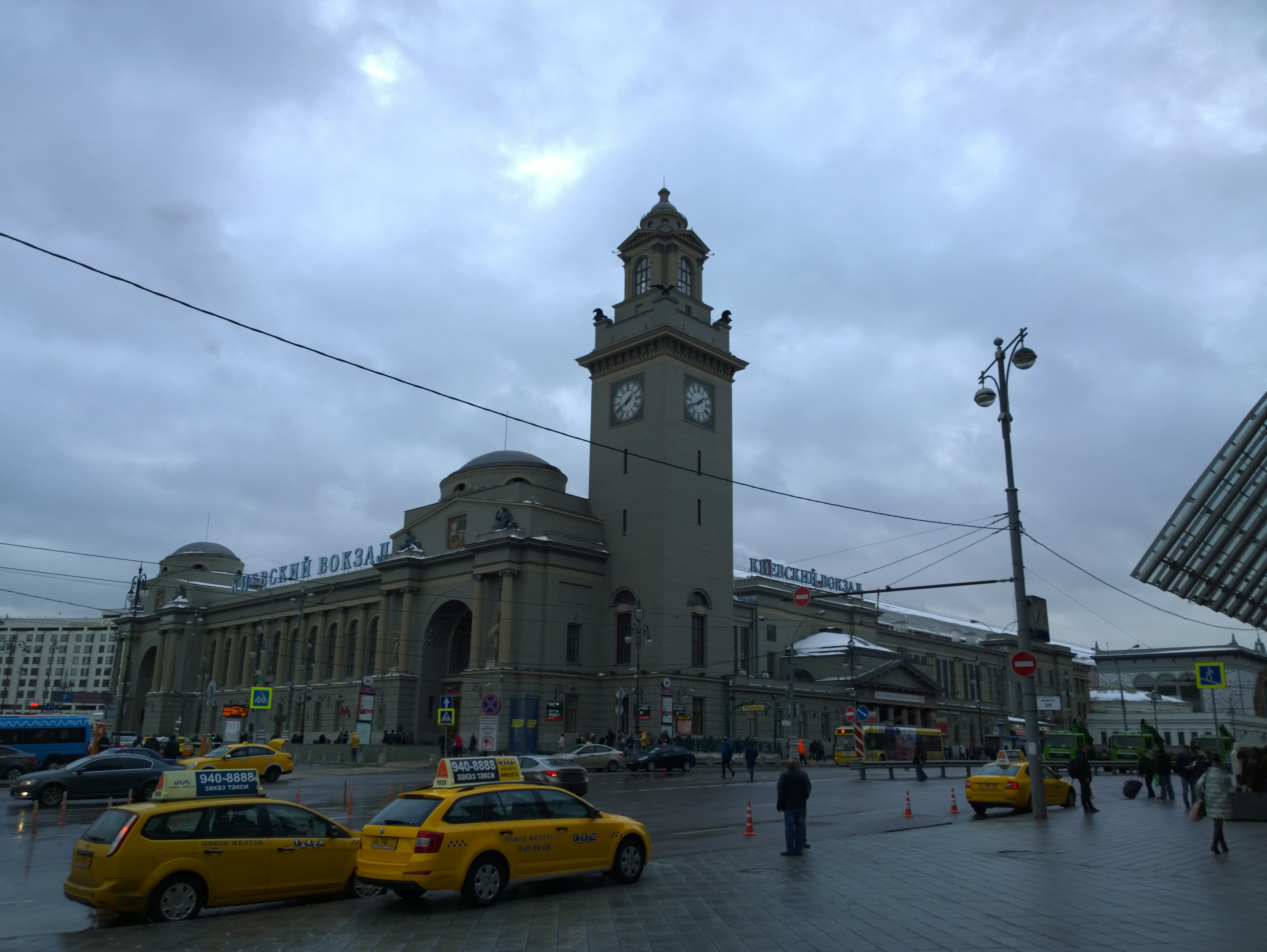 Киевский вокзал